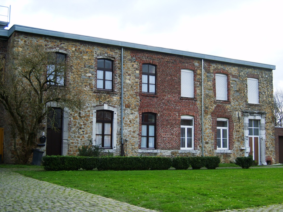 Eschweiler-Sankt Jöris: Zisterzienserinnenkloster Wohnflügel